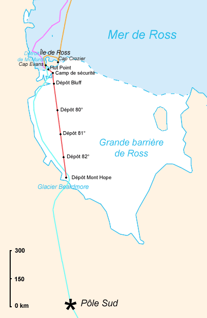 Voir Expédition Endurance La deuxième équipe de l'expédition Endurance sur une carte de l'Antarctique tel qu'il est connu de nos jours. Turquoise : le trajet de la première équipe de Shackleton tel qu'il était prévu à l'origine. Orange : le voyage de l’Aurora (jusqu'au 7 mai 1915) Rose : la tempête sur l’Aurora et sa prise dans le pack, laissant sur place une partie de l'équipe (à partir du 7 mai 1915) Rouge : la mise en place des dépôts de provisions